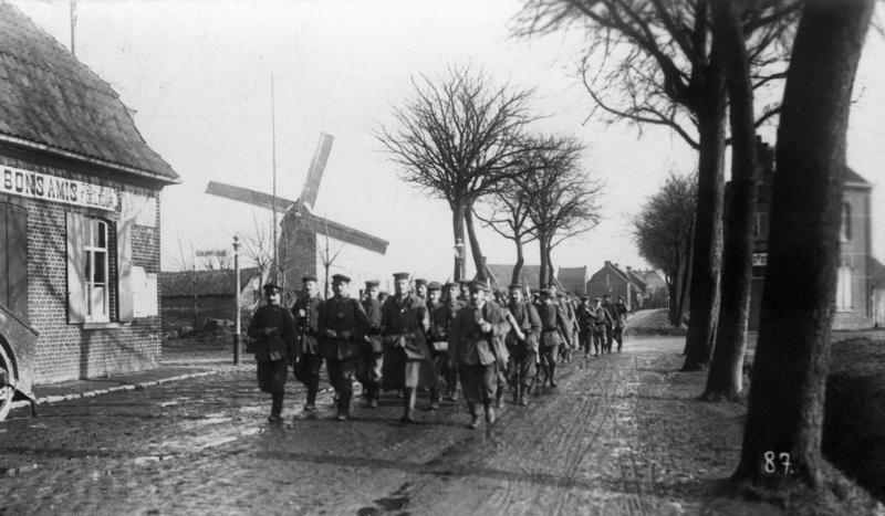 Straßenkreuz Wervicq-Tenbrielen und Wervicq-Commines Flandern 1916 Information added by Wikimedia users.